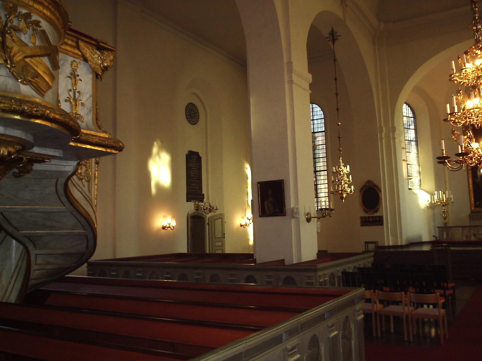 Sankt Olai kyrka i Norrköping, blick mot sakristians dörr sedd från predikstolen, den 21 november 2005. Fotograferad av Harri Blomberg.